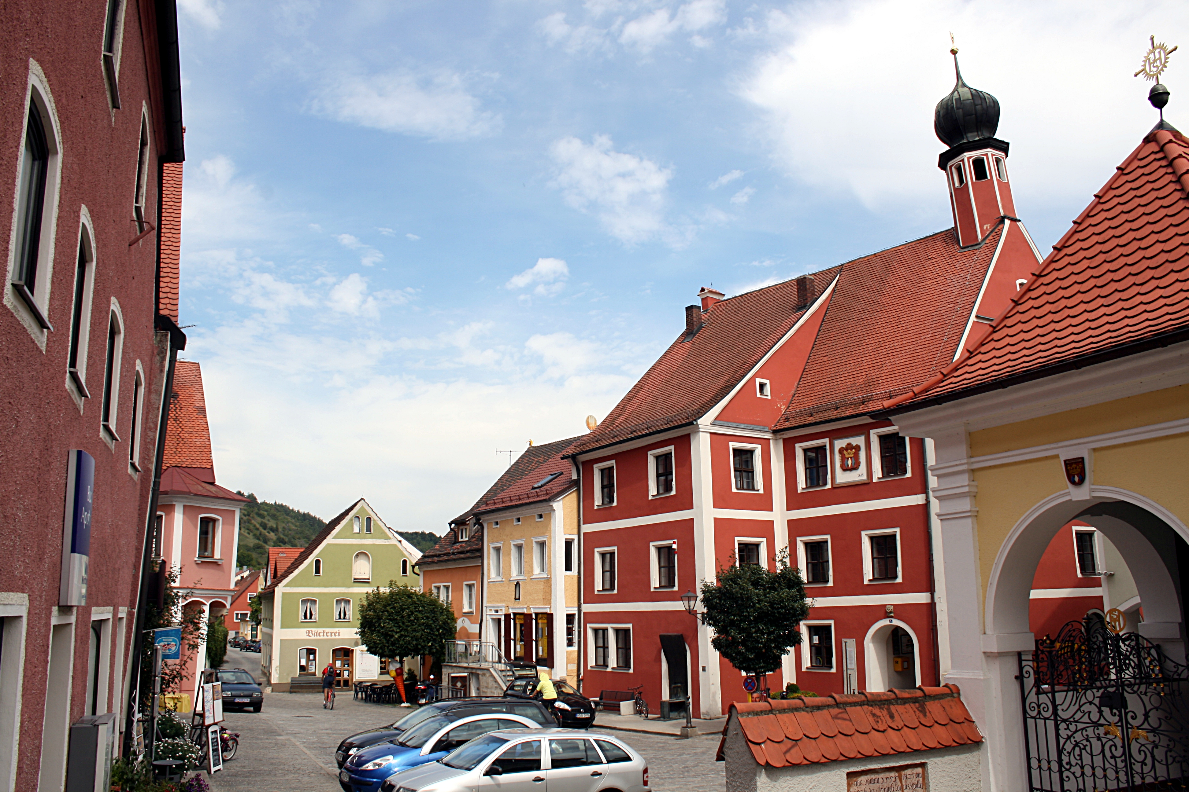 Kallmünz